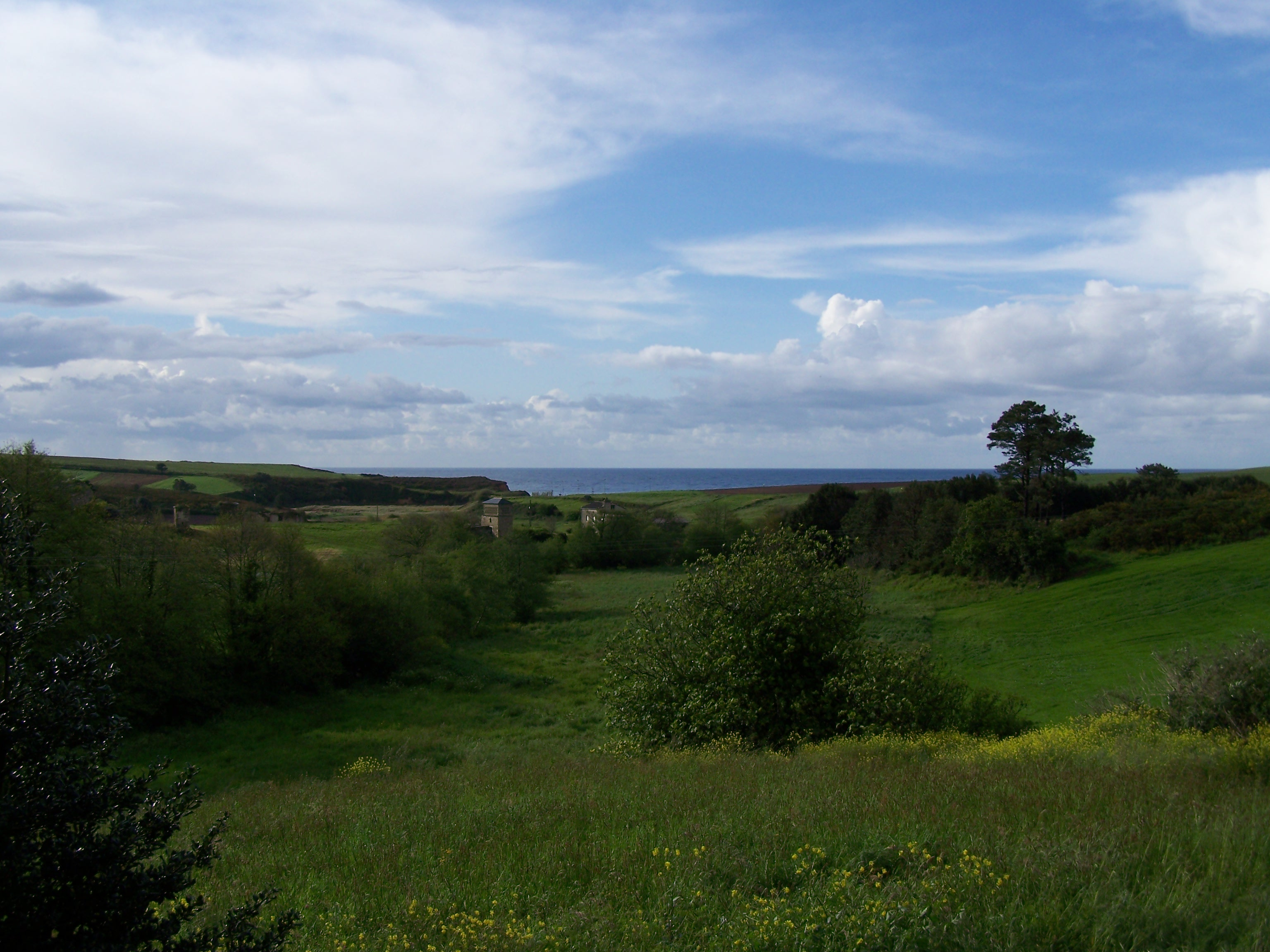 Serantes